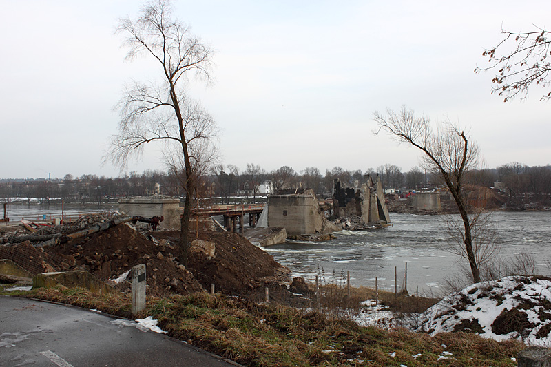 Susprogdintas Panemunės tiltas 2013 01 01